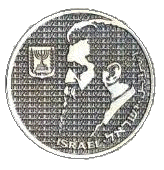 Израильские 10 шекелей 1983 года. Специальный выпуск. Аверс.